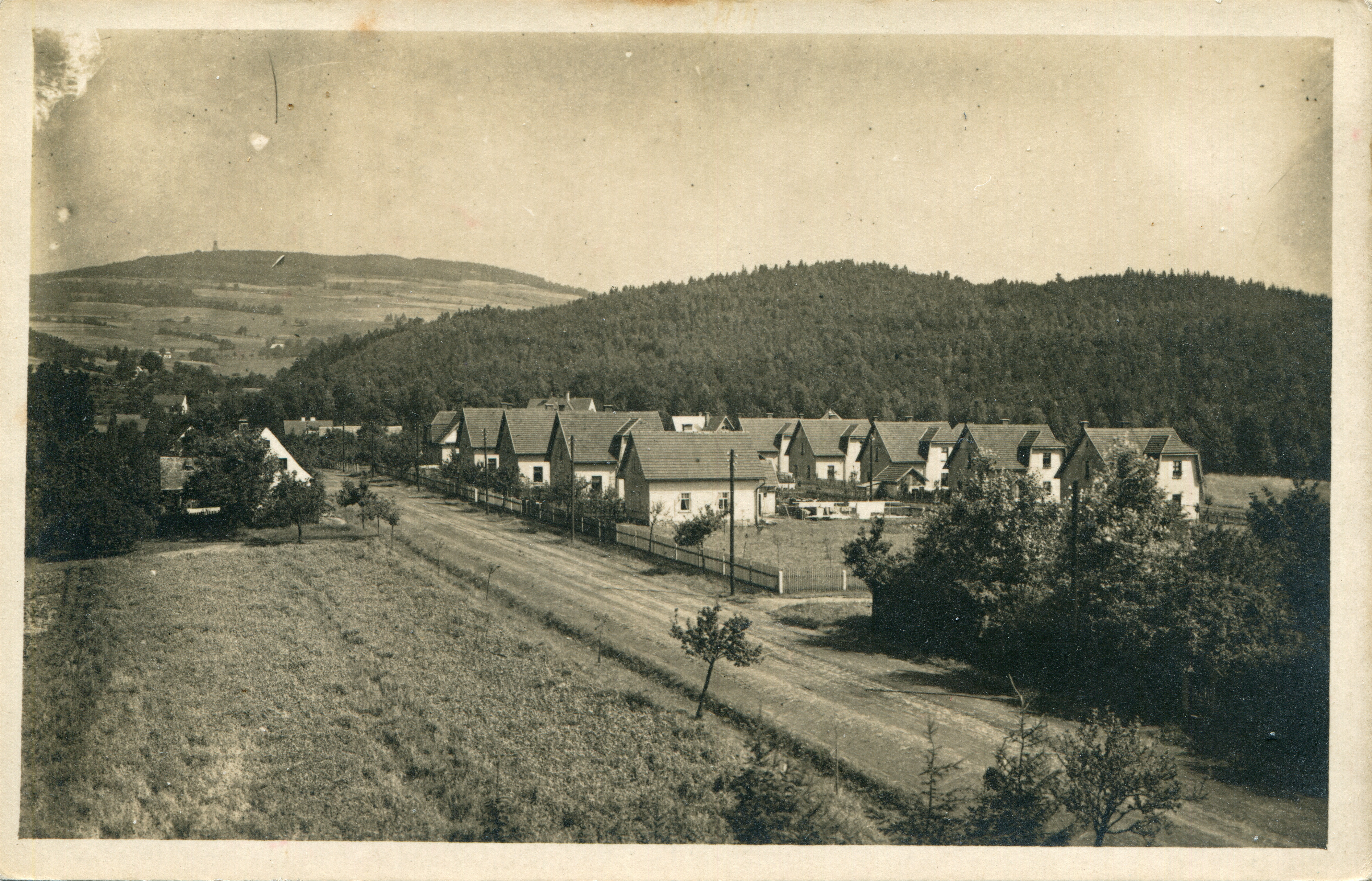 Hodkovice nad Mohelkou - Soukromá fotopohlednice, pořízená okolo roku 1925 při dokončení Kolonie.